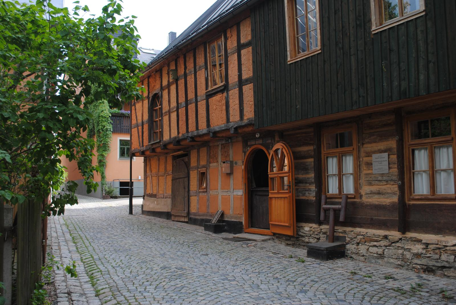 typisches Haus in der historischen Hellgasse in Adorf (Vogtland)